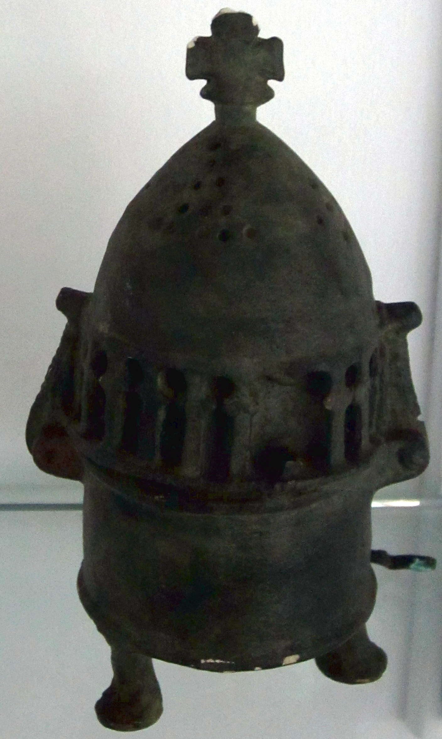 Encensoir byzantin à croix grecque, Musée archéologique de Rabat